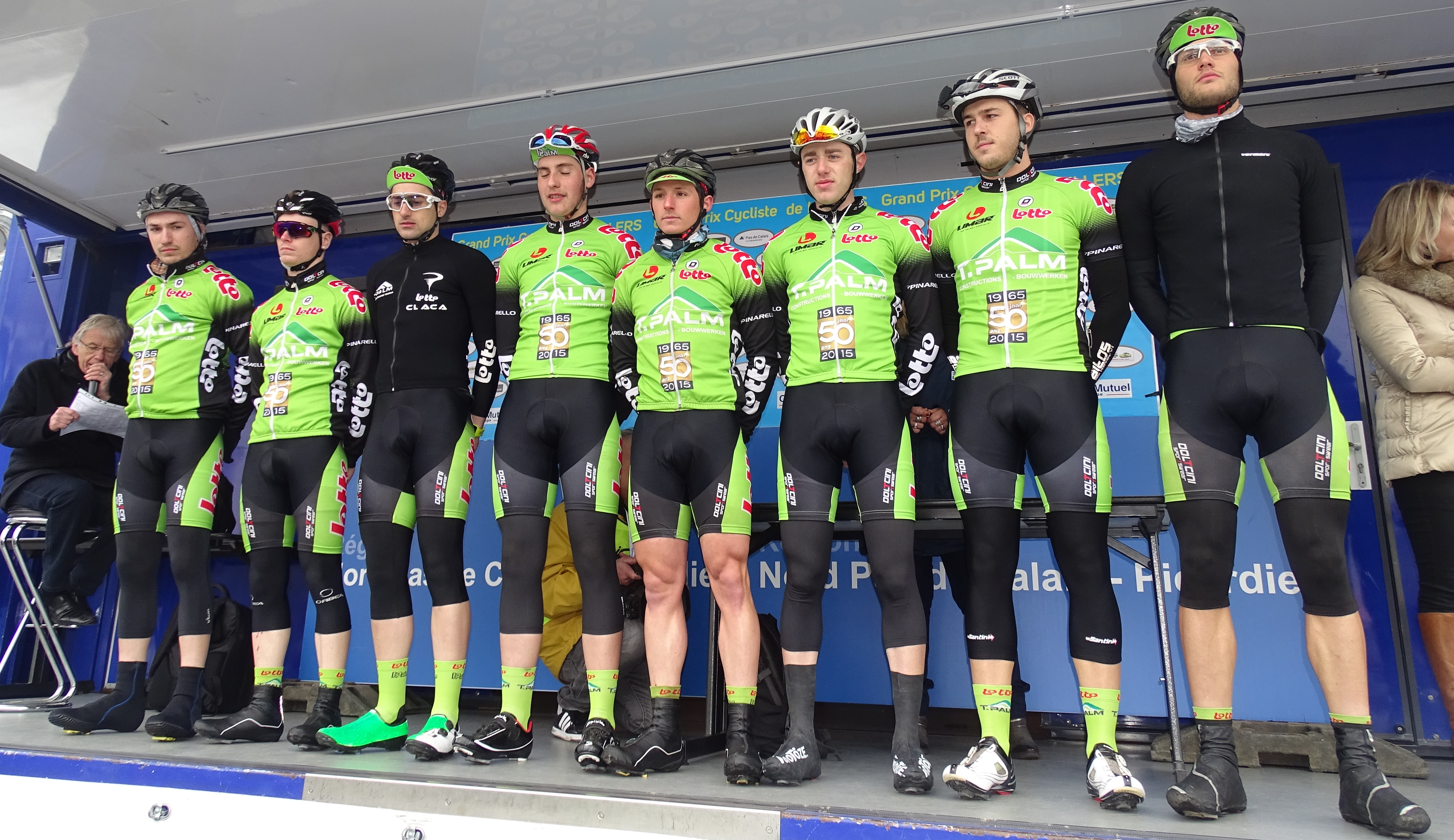 Reportage réalisé le dimanche 6 mars à l'occasion du départ et de l'arrivée du Grand Prix de Lillers-Souvenir Bruno Comini 2016 à Lillers, Pas-de-Calais, Nord-Pas-de-Calais, France.